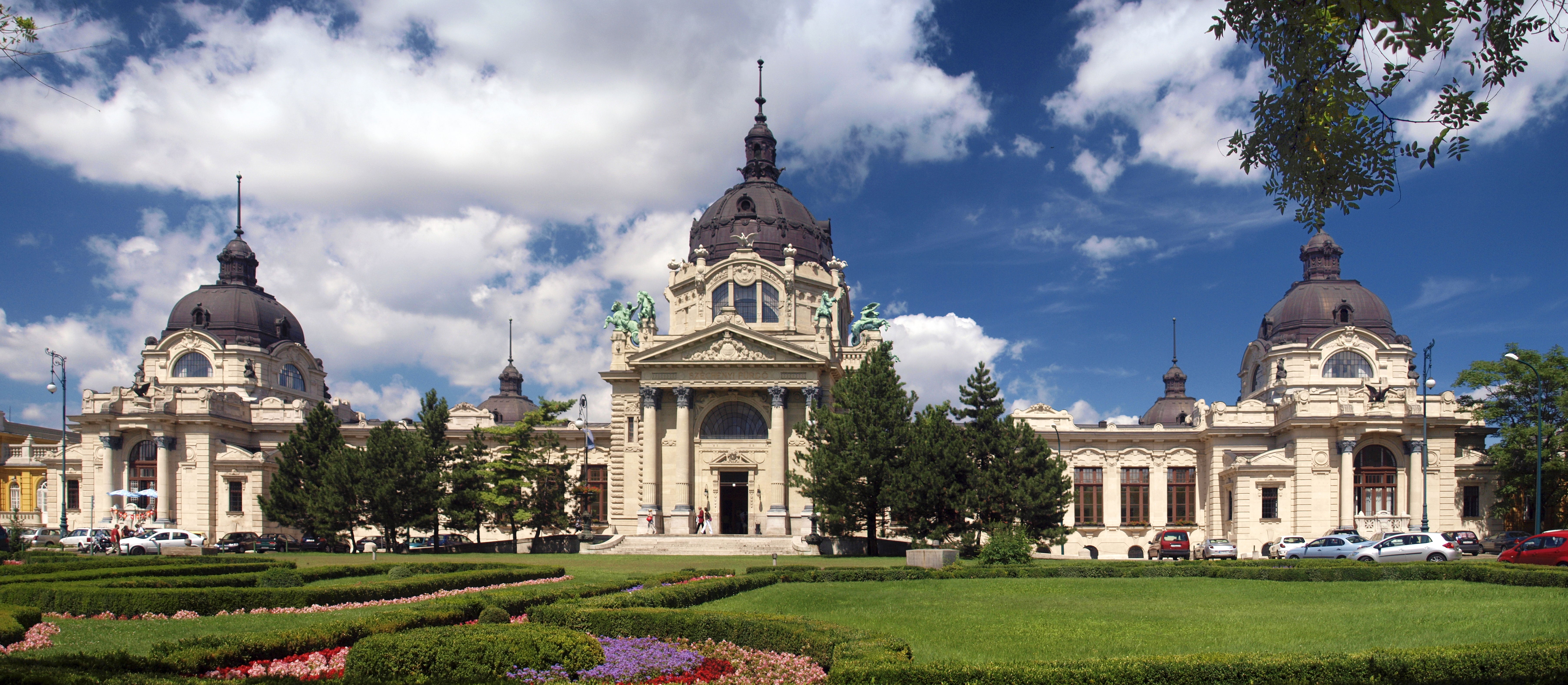 Budapest (Hongrie) - Les Bains Széchenyi fürdő